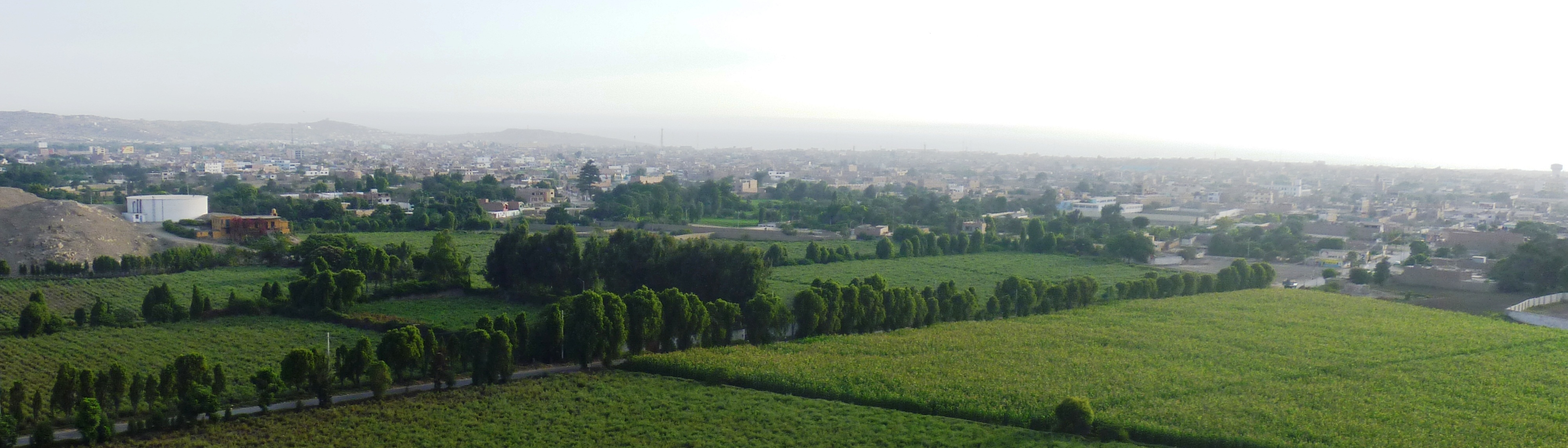 Panorámica de la ciudad de Huacho donde se parecía la zonas de Manzanares y el centro de Huacho.